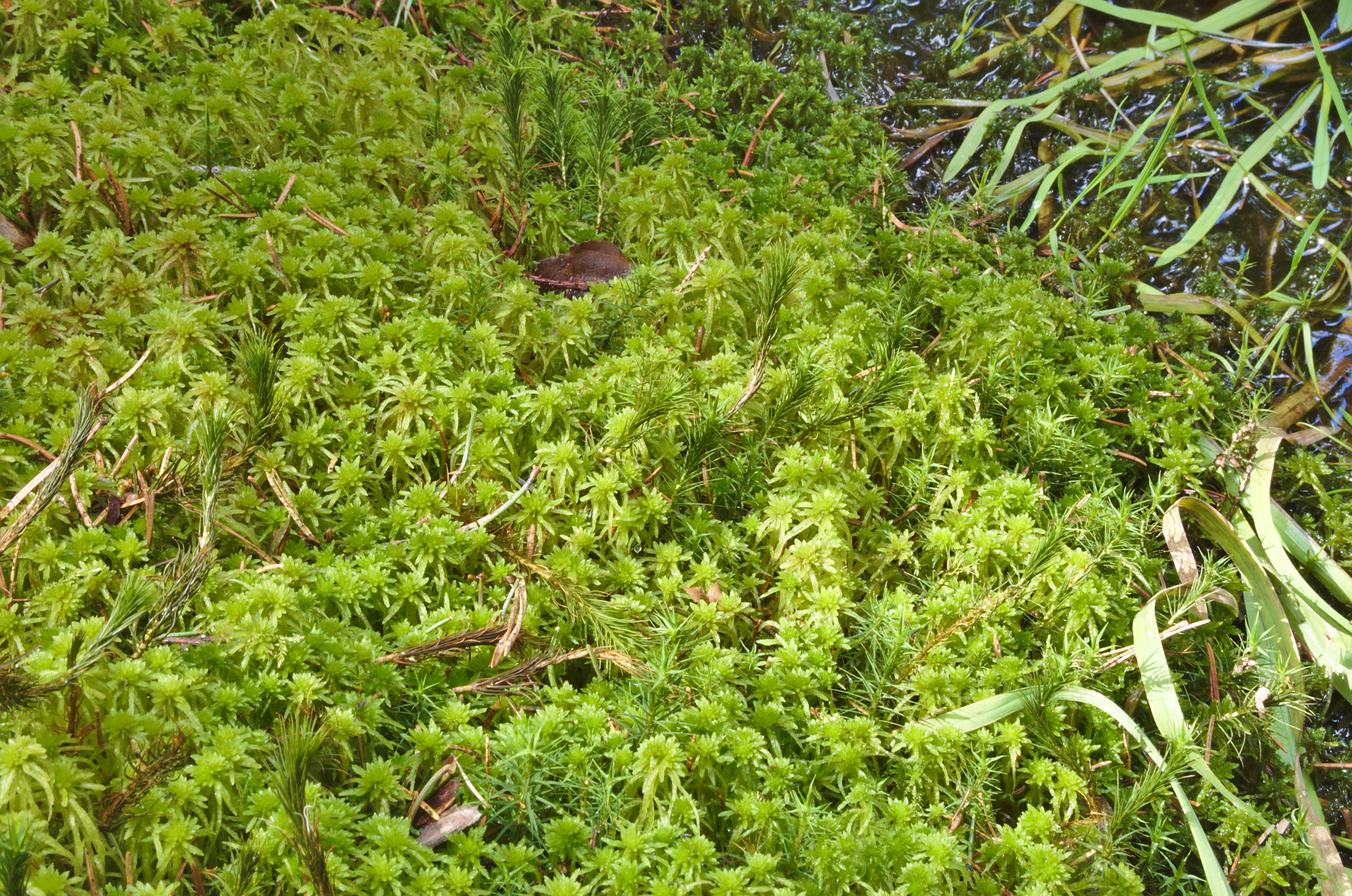 Rašeliník v rašelinném jezírku v blízkosti přírodní památky Rašeliniště v Klozovci, okres Prostějov